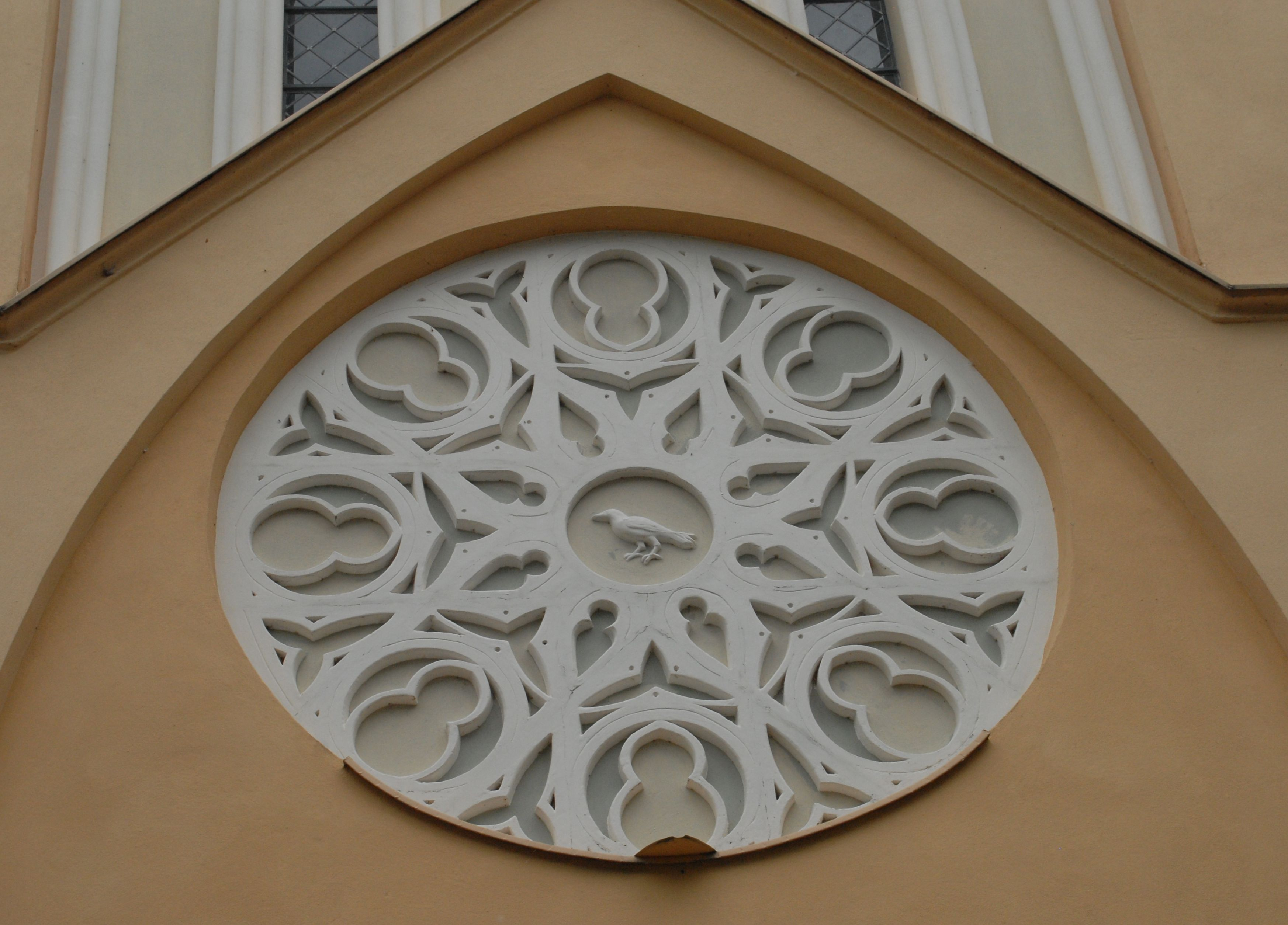 Fenster Guts- und Offiziersloge